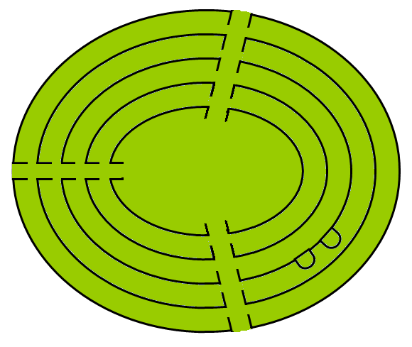 Schalkenburg